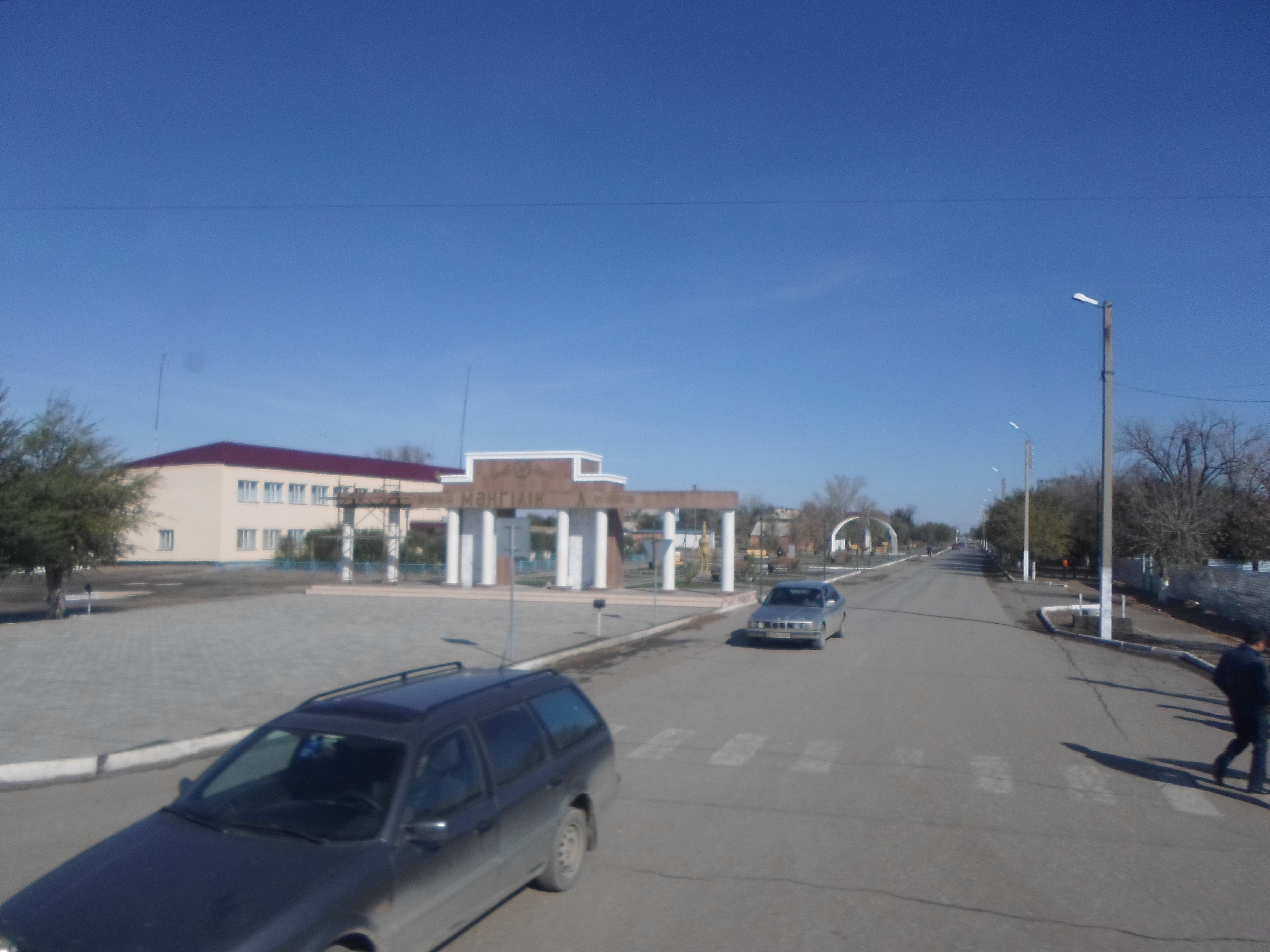 Жаңаарқа ауданының орталығы Атасу кенті